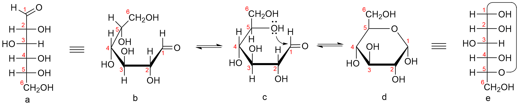 Vzájemný vztah Fischerovy, Haworthovy, a Tollensovy projekce.